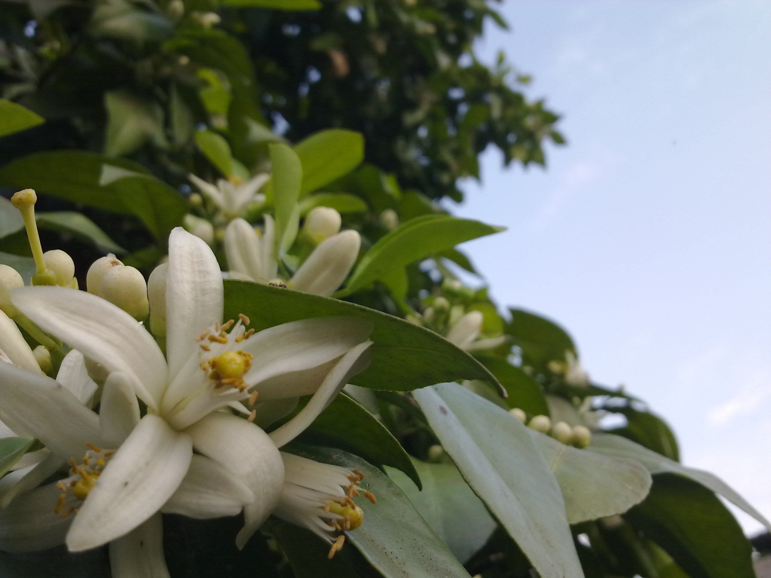 Ahoudasht-Sari-Mazandaran-Iran